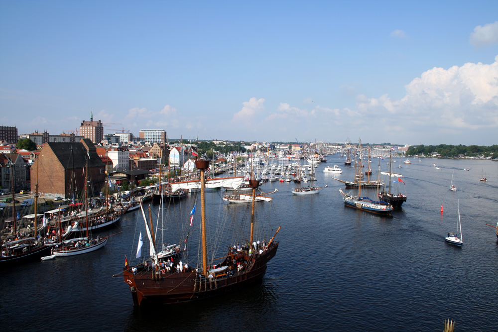 Hanse Sail 2007 mit Blick vom SILO4